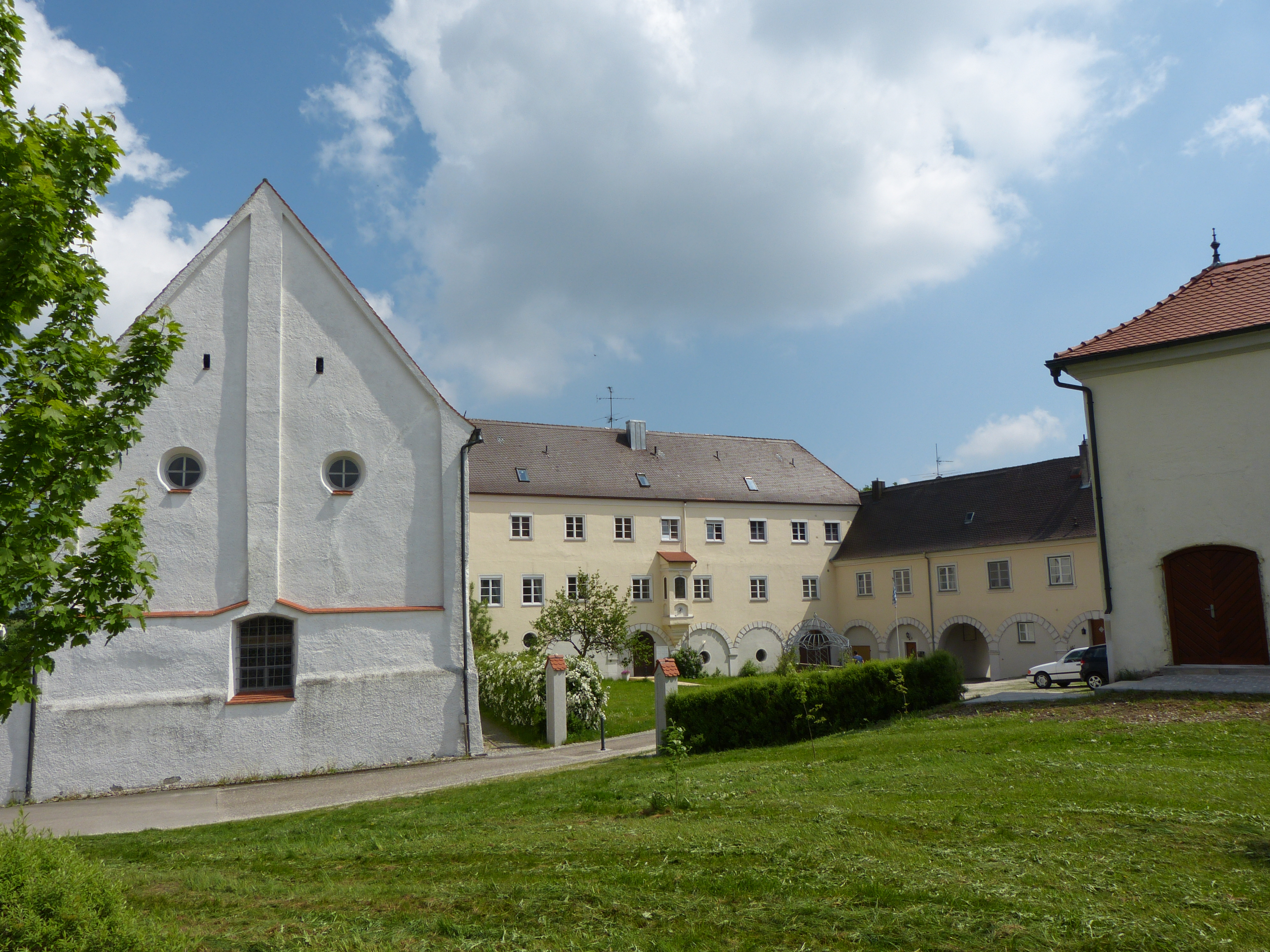 Schloss in Holzgünz, Landkreis Unterallgäu, Bayern